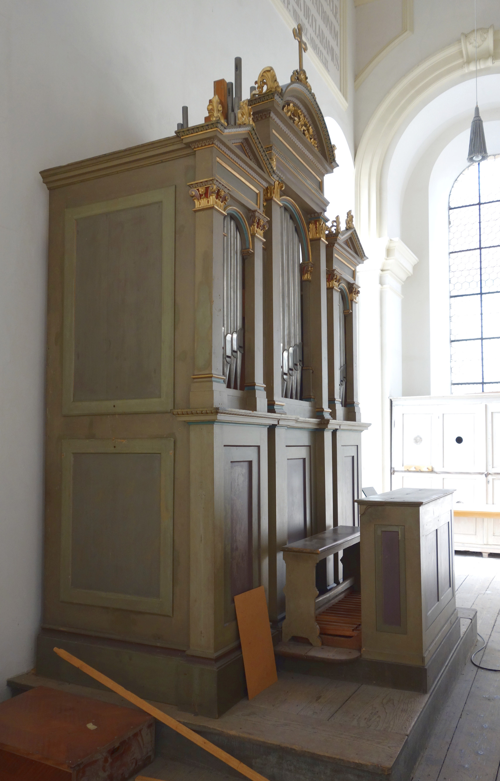 Orgel der ehemaligen Studienkirche St. Joseph in Burghausen (1884, Steinmeyer Opus 235, I/10)